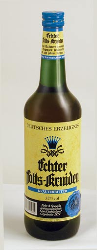 Flasche des Kruiden Kräuterbitter